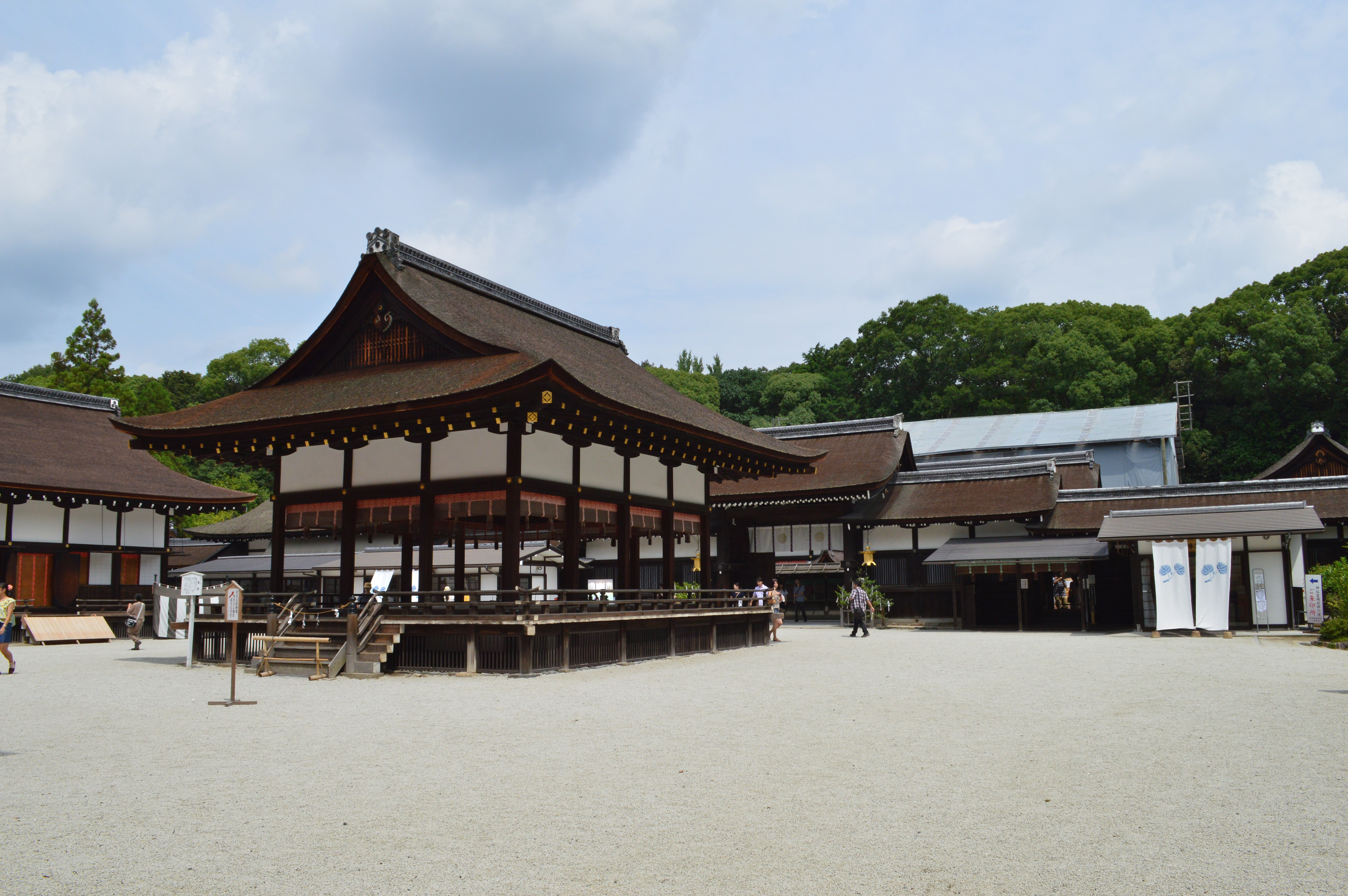 賀茂御祖神社 境内